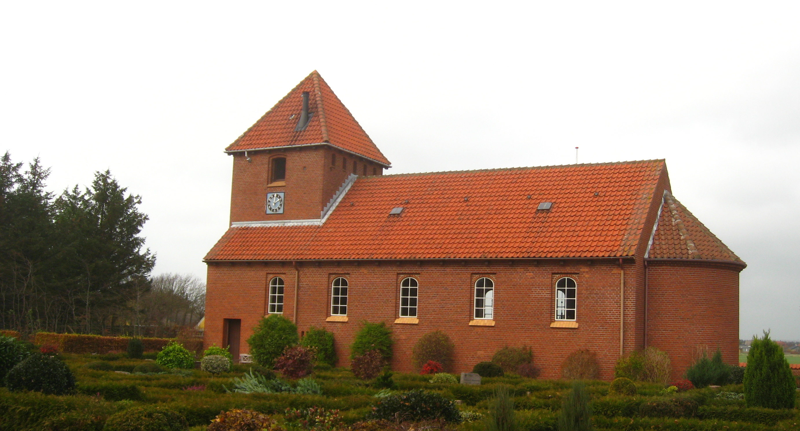 Vittrup Kirke (Børglum Sogn, Hjørring Kommune)